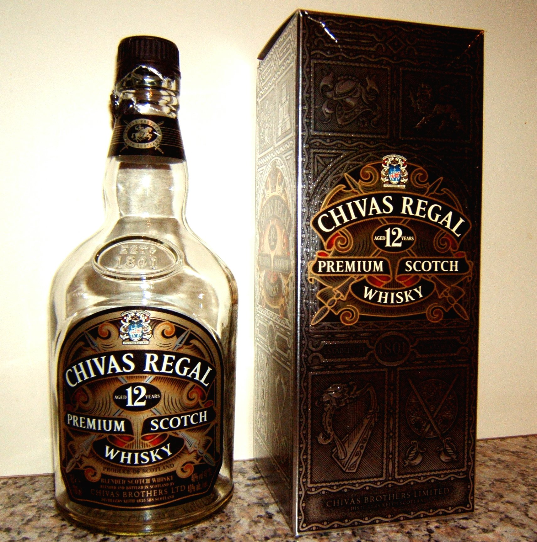 Helaas voor de liefhebbers, de fles is leeg! categorie:afbeelding logo